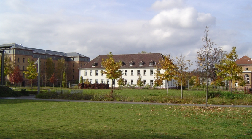 Campus der Fachhochschule Aschaffenburg mit Blick auf die Bibliothek